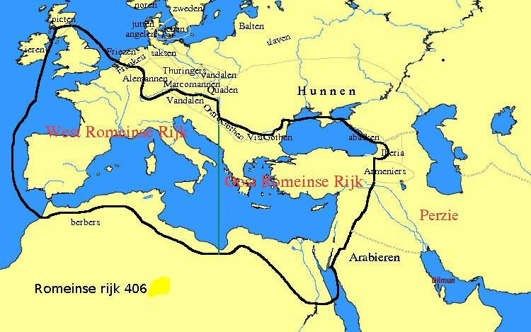 Romeinse Rijk nl:406. Dit is de situatie aan de vooravond van de invallen der Germanen. Binnen 70 jaar zal het West-Romeinse Rijk als politieke eenheid verdwenen zijn. Gemaakt door Hannes Karnoefel met de GIMP. (Aangepast door:Evil berry)